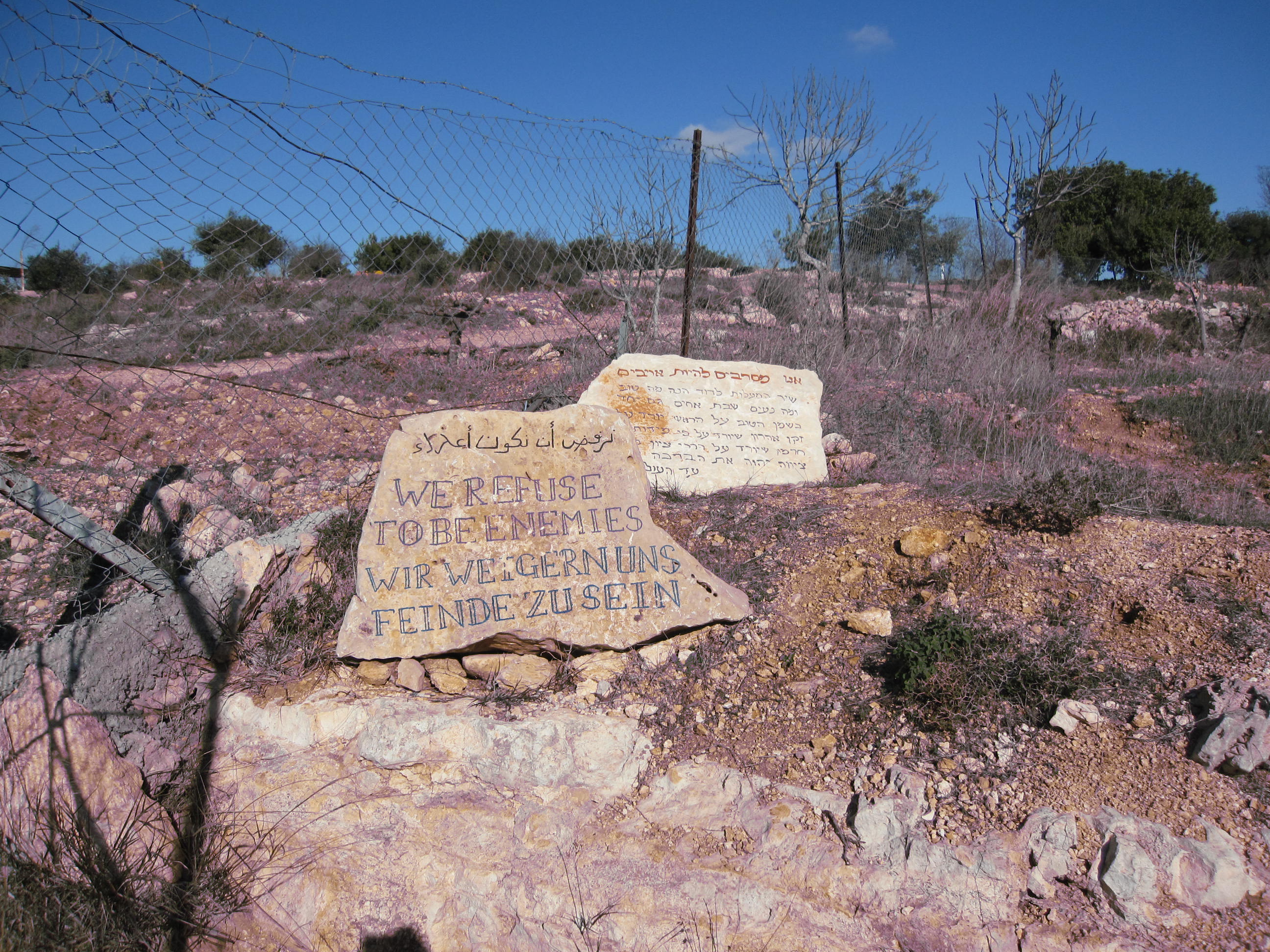 'We refuse to be enemies', tekst op de grenssteen van de Tent of Nations', het boerenbedrijf en vredesproject van de christelijke Palestijnse boer Daoud Nassar. De tekst is geadresseerd aan vijandige Israelische settlers in de omgeving die regelmatig vernielingen aanrichten.